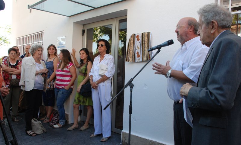 Calonge. Inauguració de l'ampliació de l'escola de Música Adrià Sardó a l'Hotel d'Entitats de Calonge. L'acte va aplegar la presència del músic Adrià Sardó, fundador de l'escola. Cultura i Equipaments.